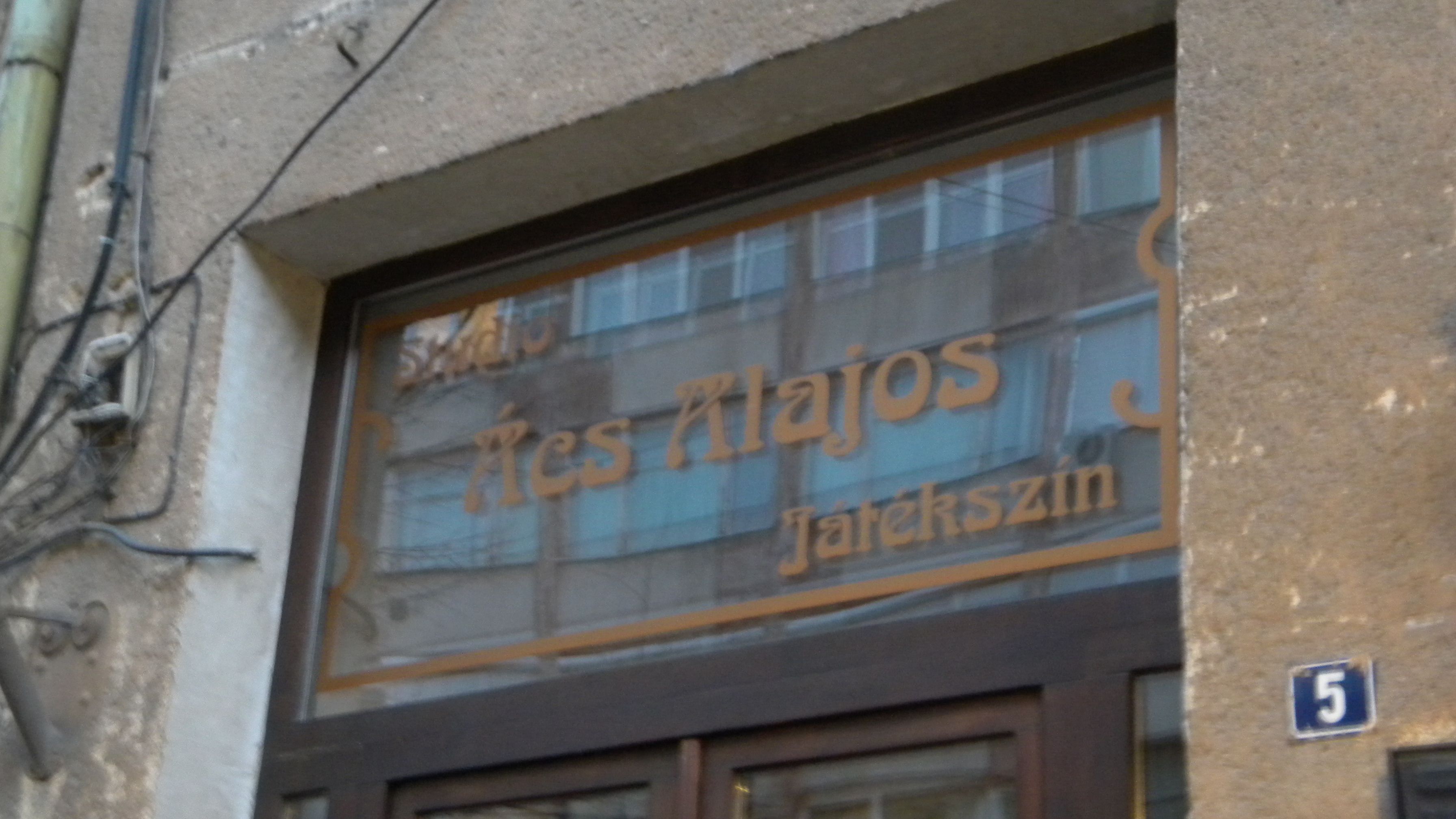 Felirat az Ács Alajos Játékszín bejáratánál - Studioul Ács Alajos